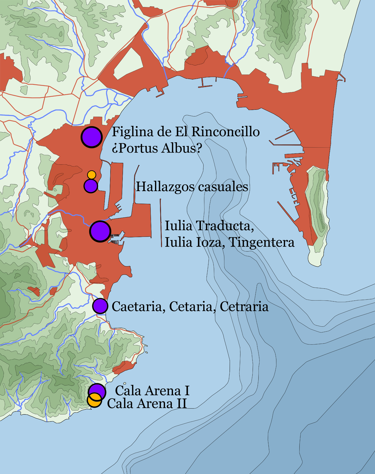 Mapa indicativo de los yacimiento de época romana (violeta) y púnica (naranja) en el termino municipal de Algeciras, Andalucía, España.